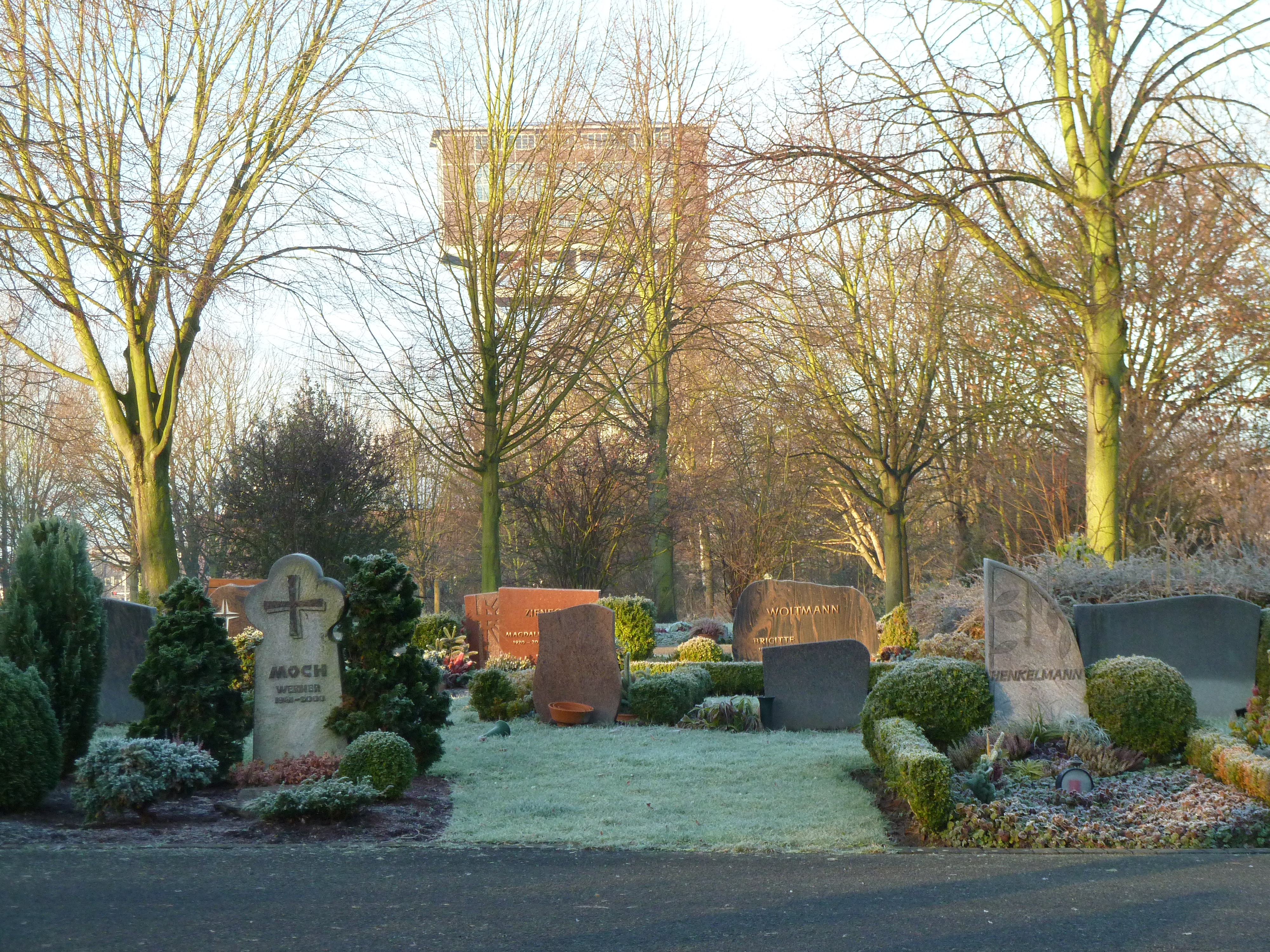 Nordfriedhof Dortmund und Förderturm Zeche Minister Stein im Winter 2012